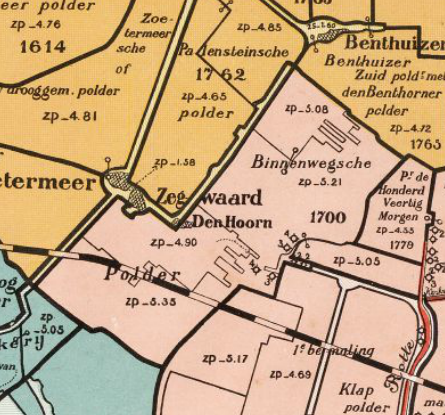 Binnenwegsche_Polder